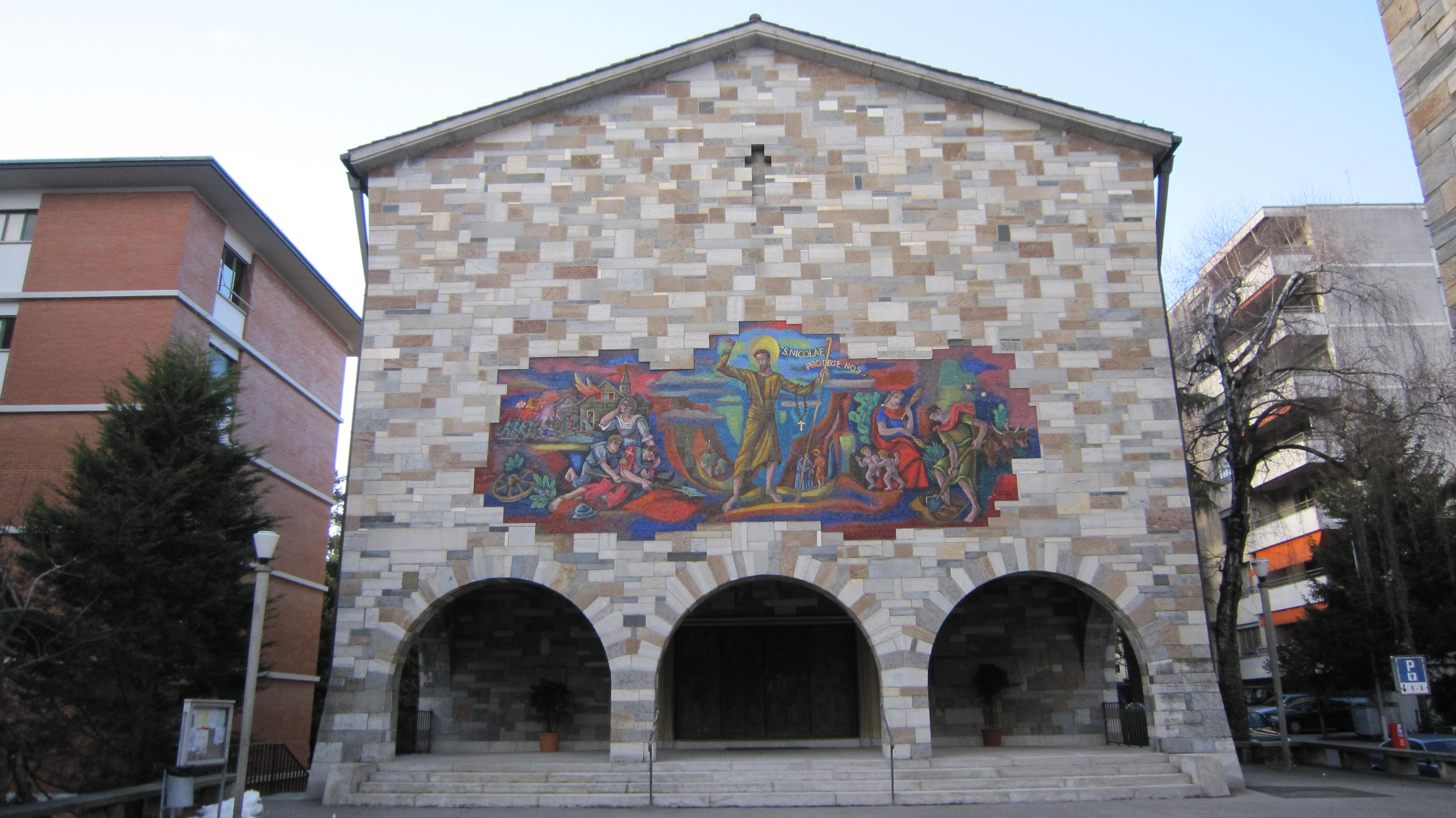 Facciata Chiesa San Nicolao della Flue - Lugano